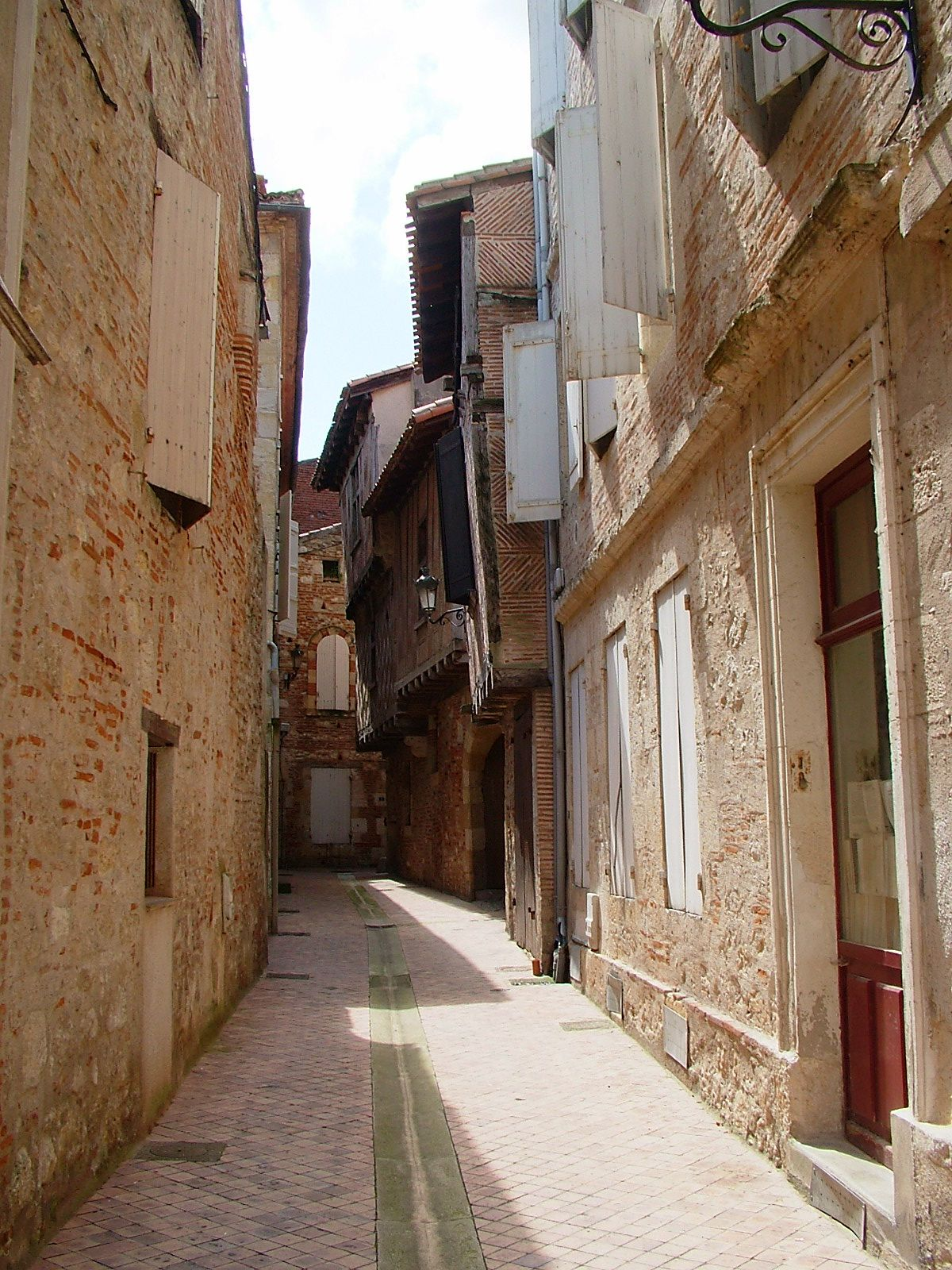 France, Lot-et-Garonne, Agen, ruelle